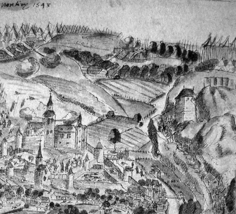 Ausschnitt aquarellierte Zeichnung Monschauer Burg und Haller